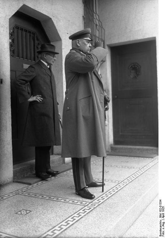 Paul von Hindenburg, deutscher Reichspräsident. Momentaufnahmen, aufgenommen bei politischen Veranstaltungen unter Anwesenheit von Hindenburg. Letzte Aufnahme des Reichspräsidenten während einer Huldigung vor seiner Villa in Hannover. Information added by Wikimedia users.im Hintergrund vermutlich sein Adjutant Oberstleutnant a. D. Wilhelm von Kügelgen.